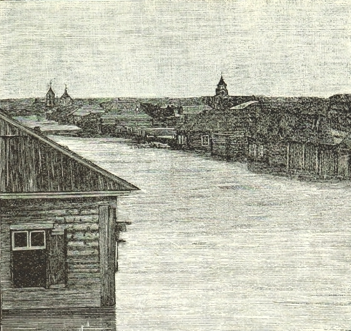 Беларуская (тарашкевіца): Дрыса (Drysa), рака Дзьвіна (Dźvina)